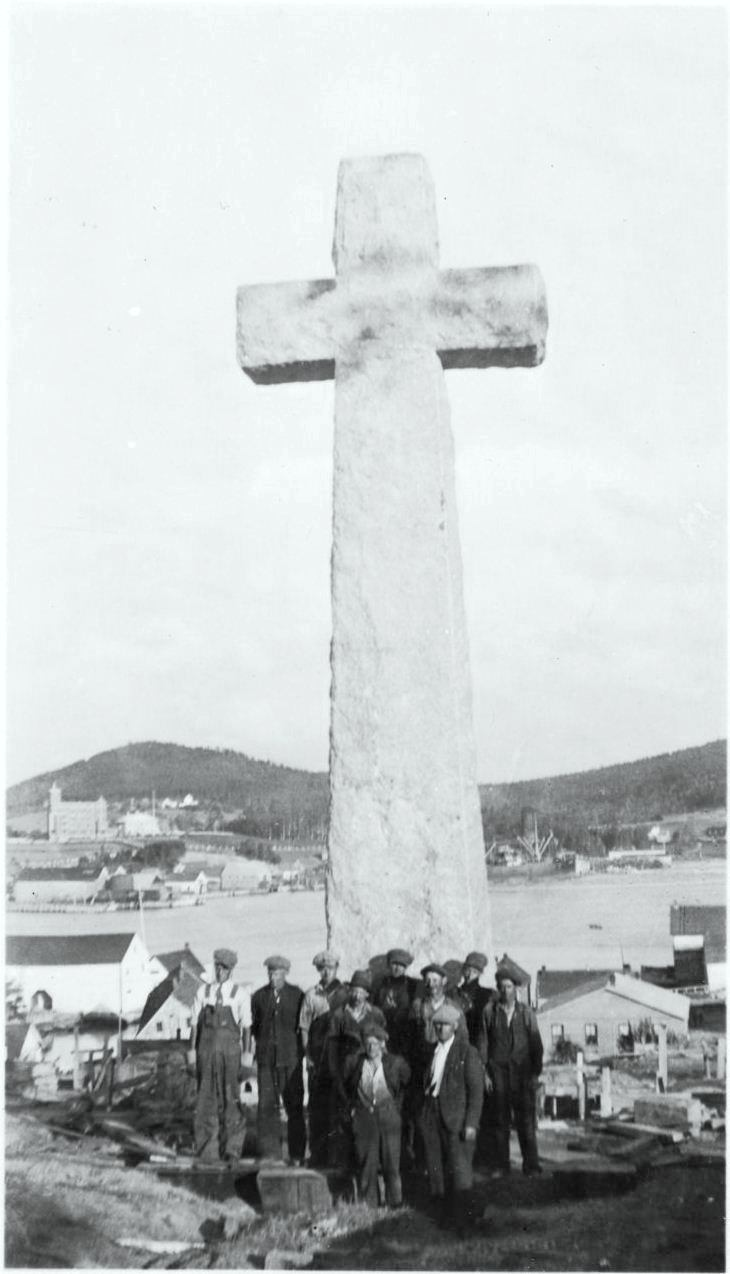 Monument en hommage à Jacques Cartier, Gaspé 4e centenaire de l'arrivée de Cartier à Gaspé